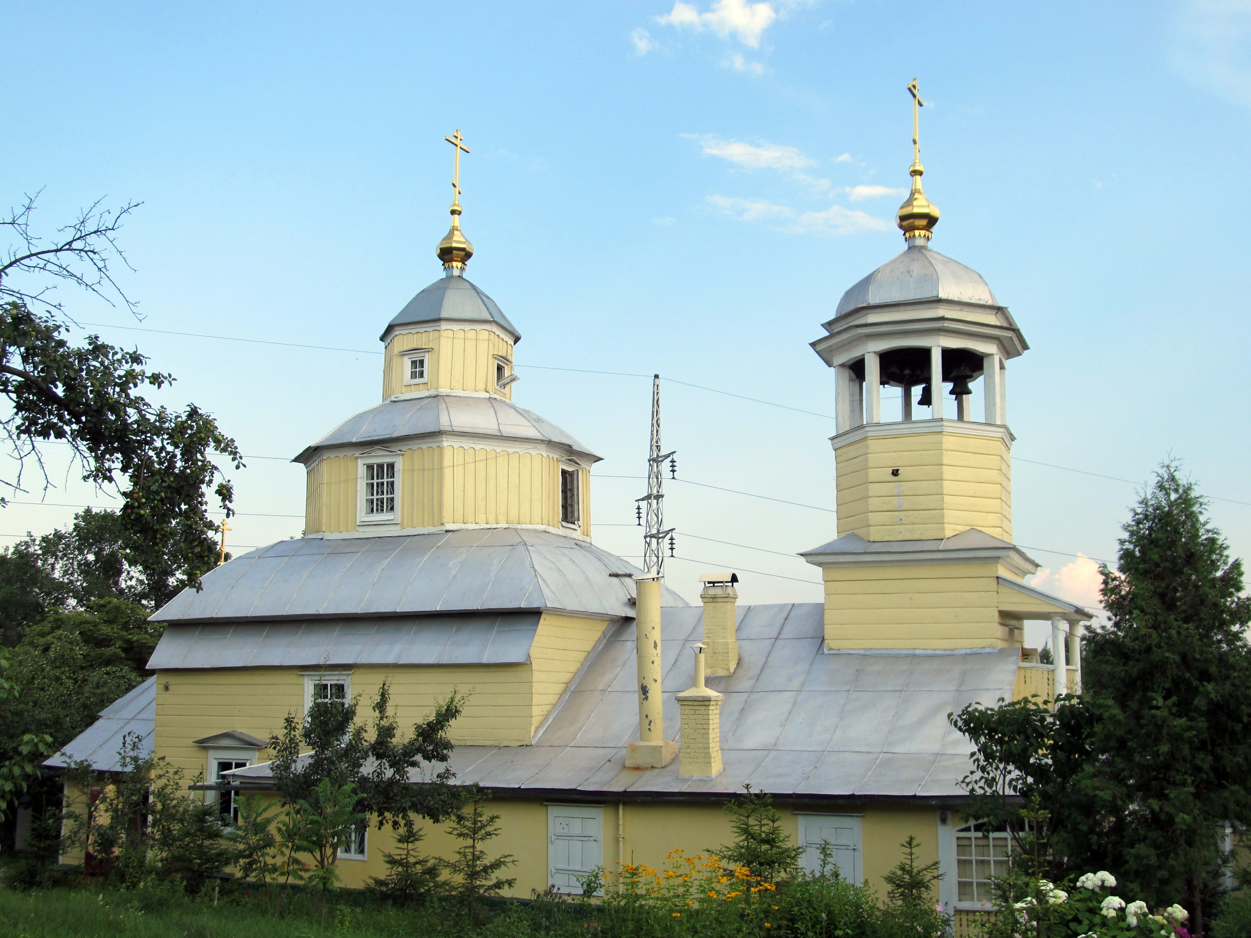 Беларуская (тарашкевіца): Ільлінская царква. г. Гомель This is a photo of Belarusian heritage monument. Reference number: 312ВГ000029 ( WLM)